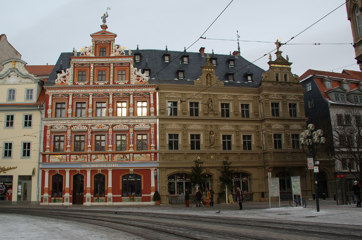 Haus zum breiten Herd und Gildehaus am Fischmarkt in Erfurt